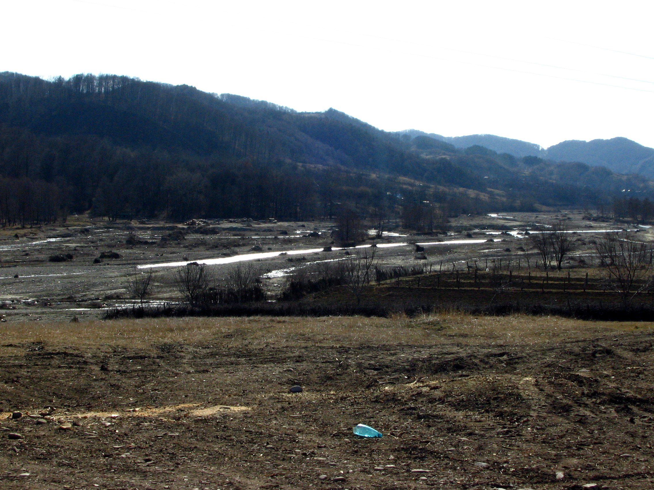 Bâsca Chiojdului River, near Cislău, Romania